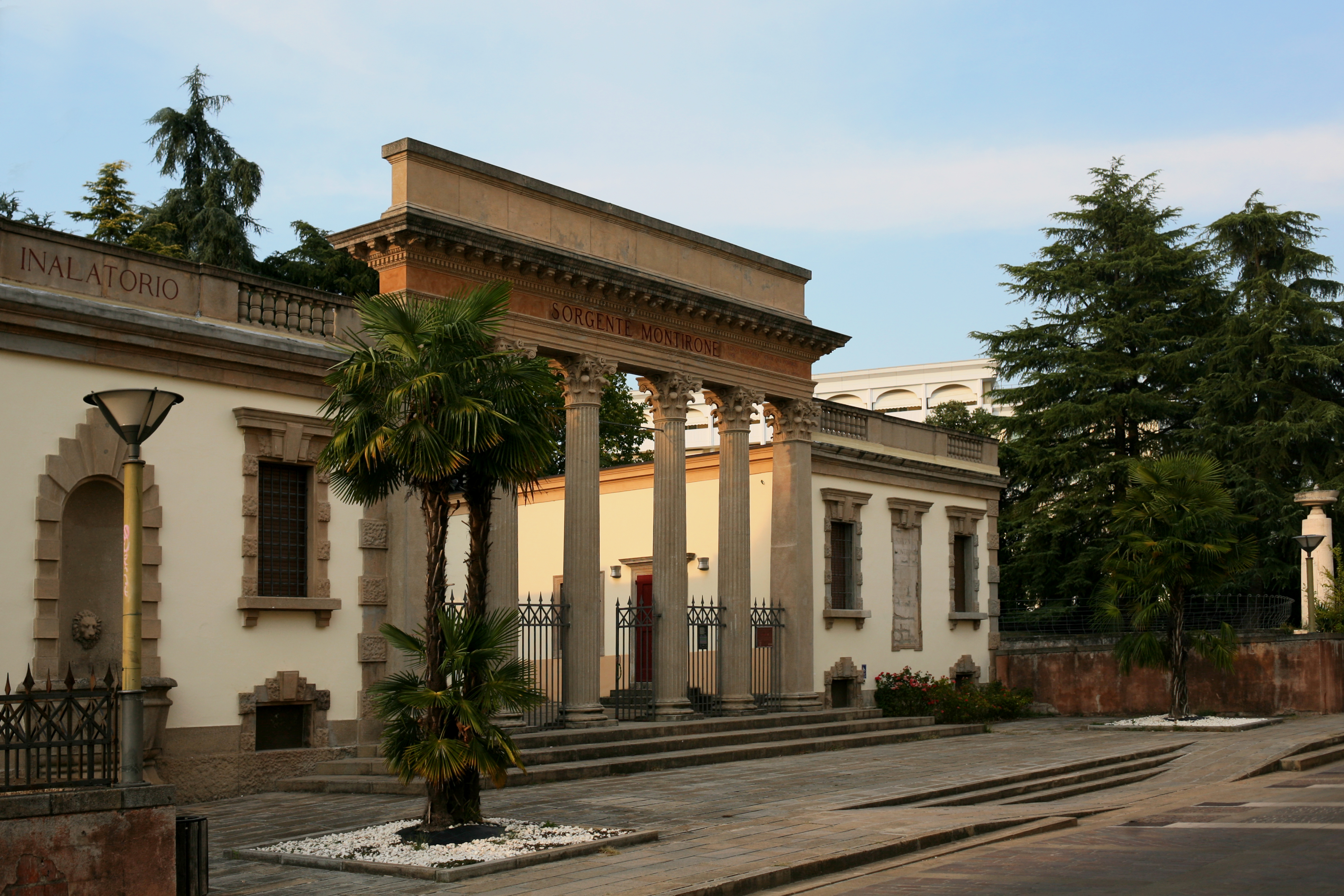 Ingresso alle sorgenti Montirone ad Abano Terme, opera di Giuseppe Jappelli, veduta di tre quarti